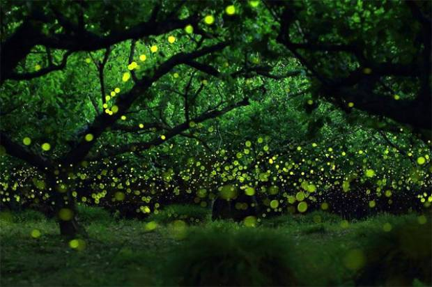 Santuario de las luciérnagas